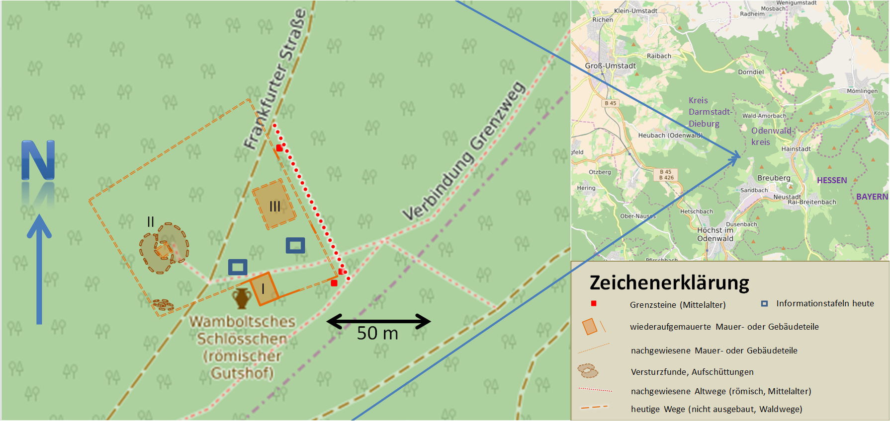 Skizze der Lage und der Struktur des römischen Lagers (Siedlungsstelle) genannt "Wamboltsches Schlösschen"; Lage der Strukturen nach den Aufzeichnungen von 09/1988 und den Unterlagen im Katasteramt Dieburg (Aufmessung durch Steincke); Kartenmaterial: Open Street Map; Zeichnung selbst erstellt